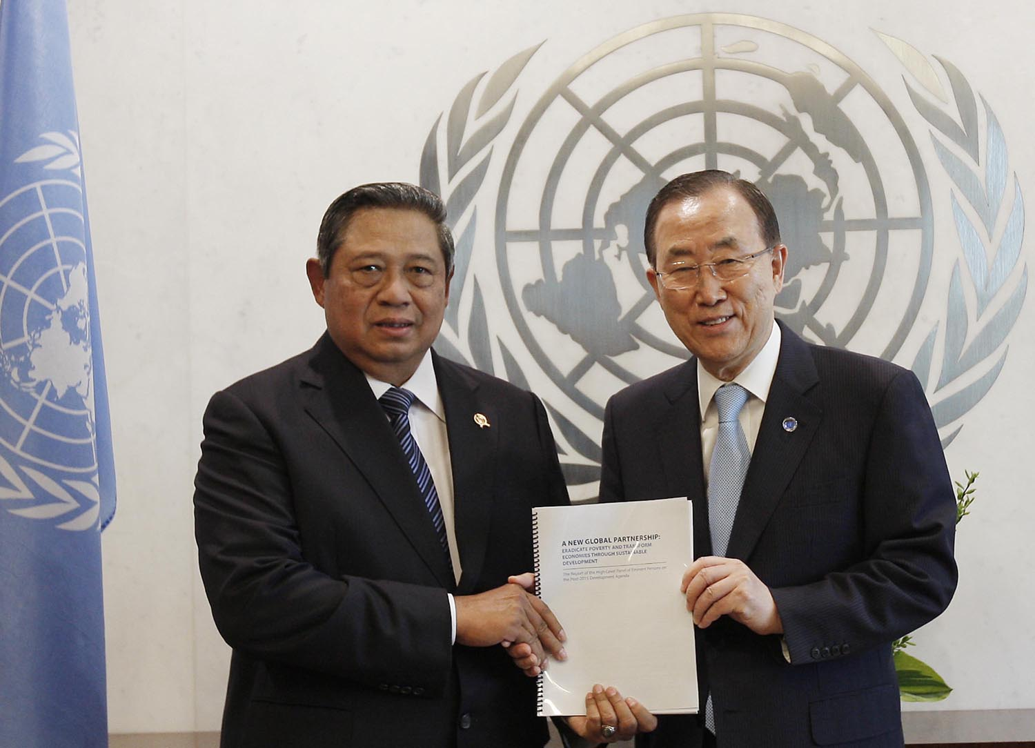 SBY menyerahkan laporan akhir Panel Tingkat Tinggi untuk Agenda Pembangunan Pasca 2015 kepada sekretaris jenderal PBB di New York, 30 Mei 2013.